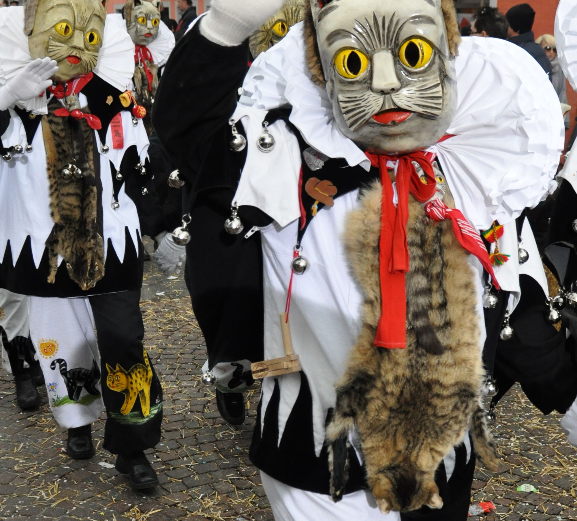 Katzenzunft Meßkirch, Narrenfigur: Katze. Fotografiert beim Landschaftstreffen der Vereinigung Schwäbisch-Alemannischer Narrenzünfte (VSAN) 2014 in Tettnang; Narrensprung am Sonntag, 16. Februar 2014 (Bildausschnitt..